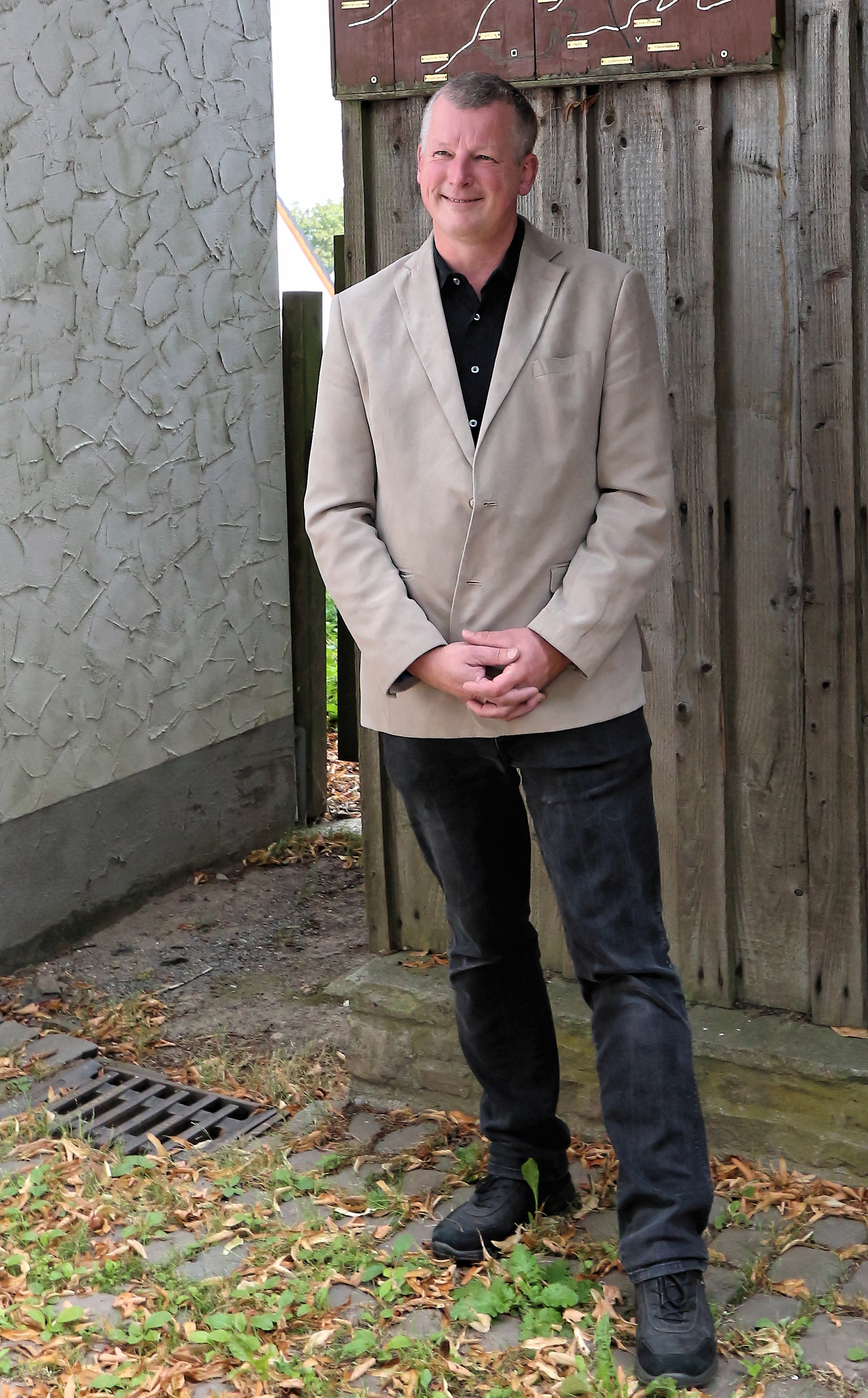 Christian Schulze (Medizinhistoriker)